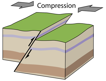 Schéma 3D d'une Faille Inverse (Géologie, Tectonique) 2005 R.Lacassin